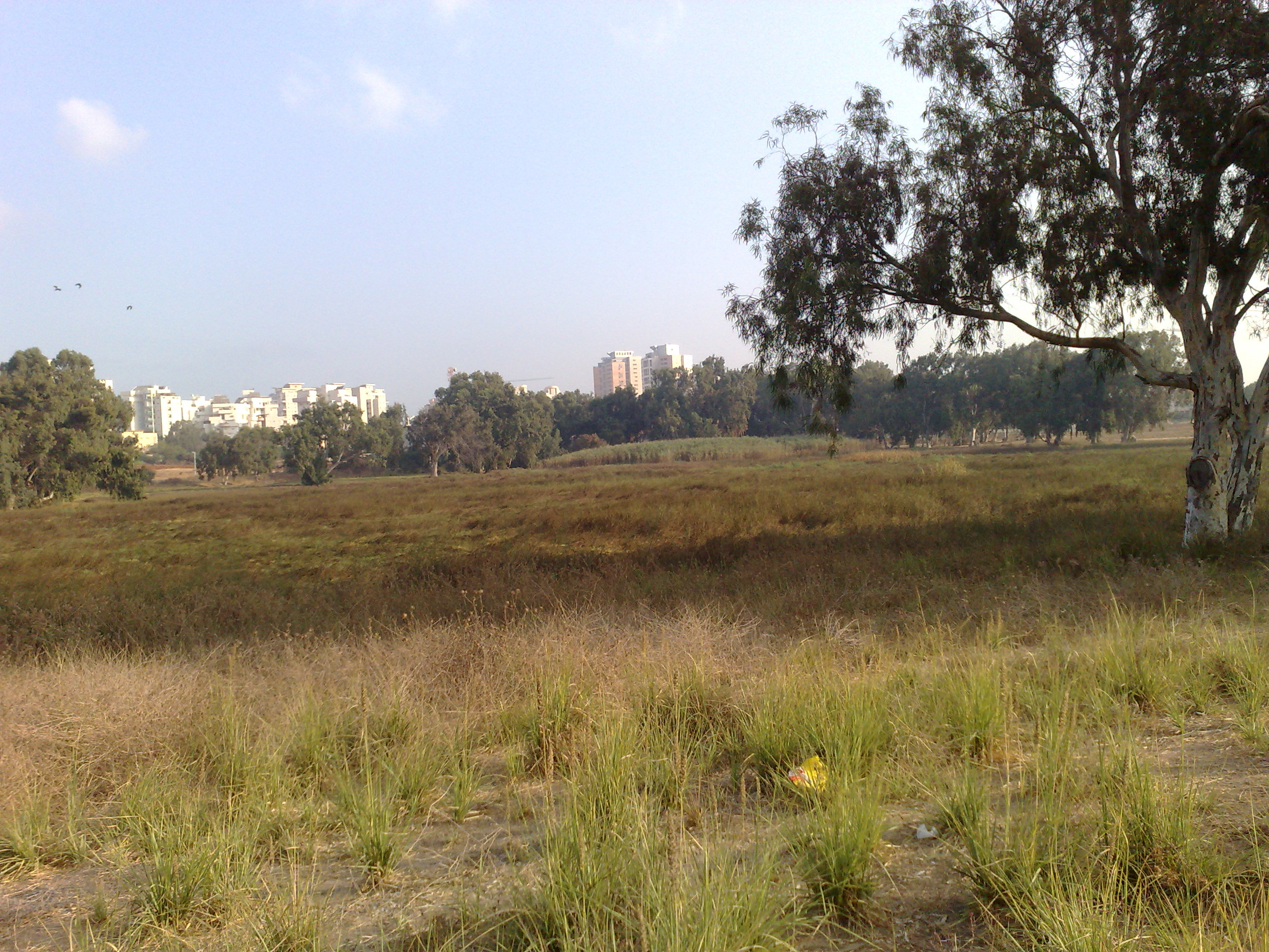 בריכת דורה קיץ rain pool on summer